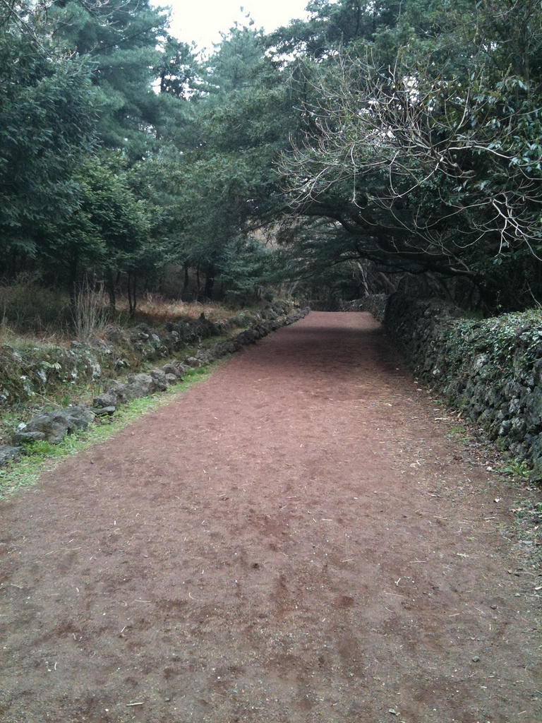 제주 비자림, Jeju Bijarim